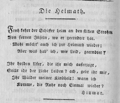 Erstdruck von Friedrich Hölderlins Die Heimath, Version mit 2 Strophen im Taschenbuch für Frauenzimmer von Bildung 1799.